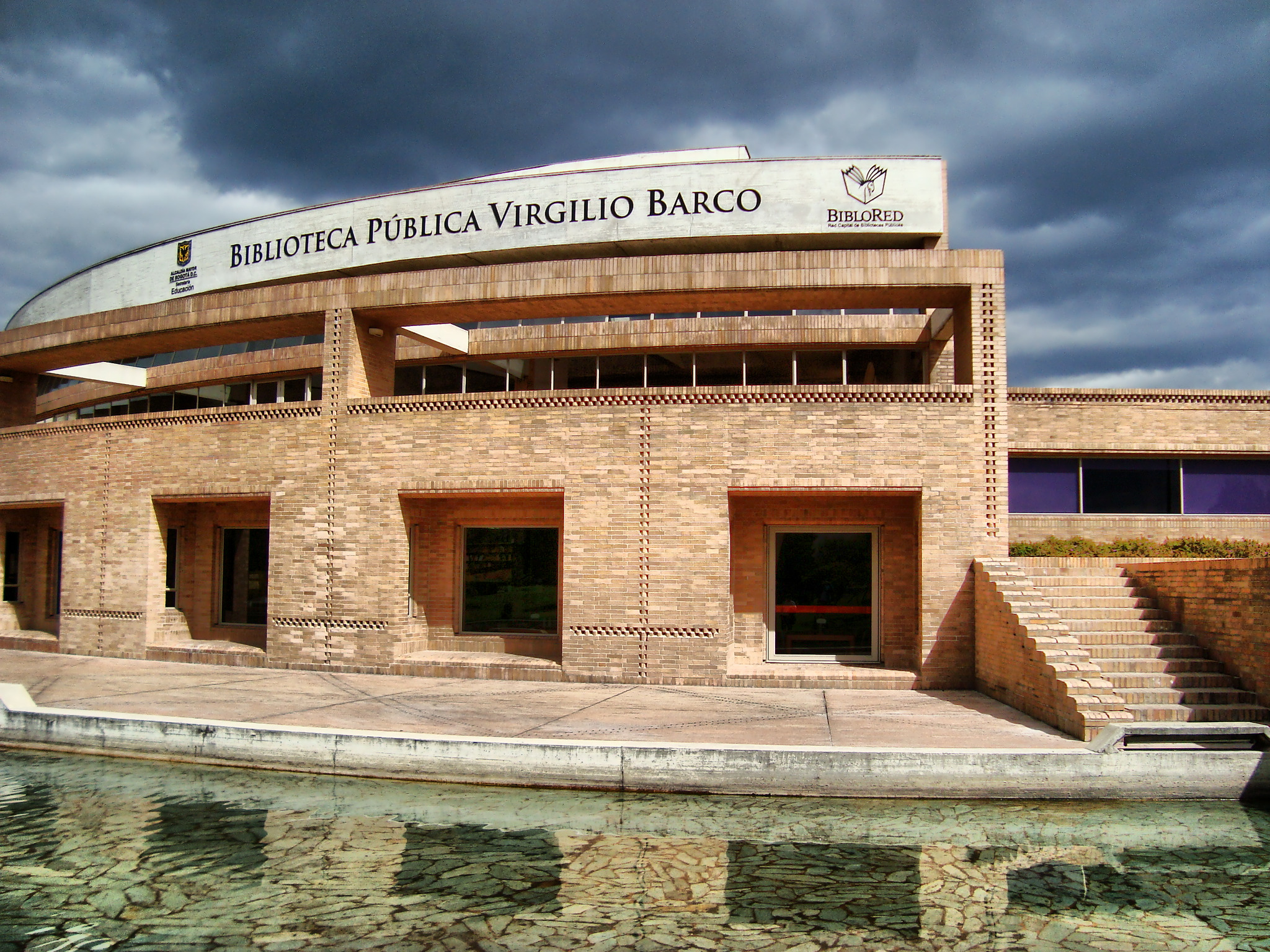 Parque y Biblioteca Pública Virgilio Barco